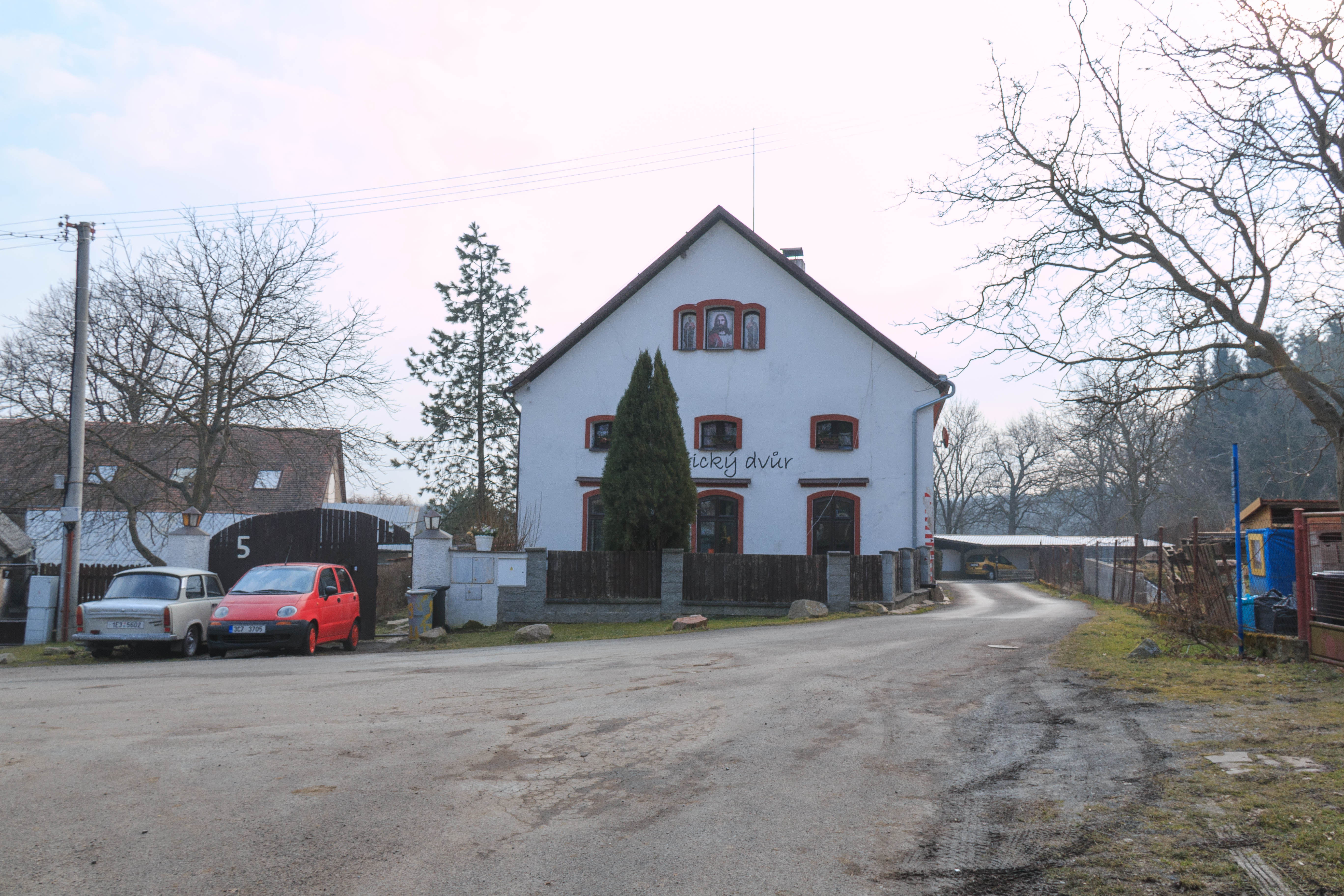 Obořice - Obořický dvůr